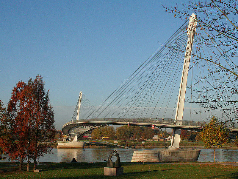 La passerelle du jardin des Deux-Rives vue du côté allemand